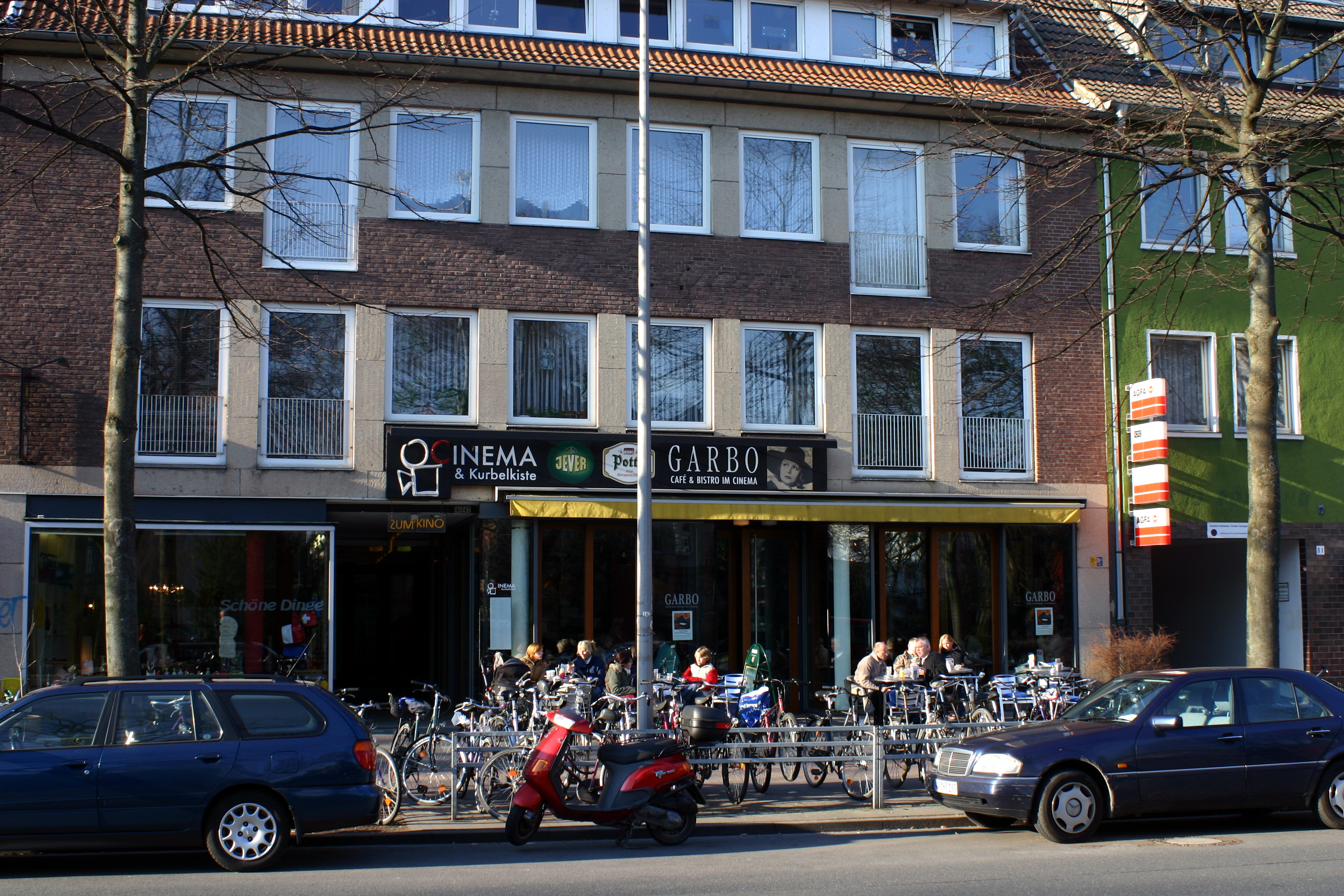 Das über drei Kinosäle verfügende Kino Cinema an der Warendorfer Straße in Münster